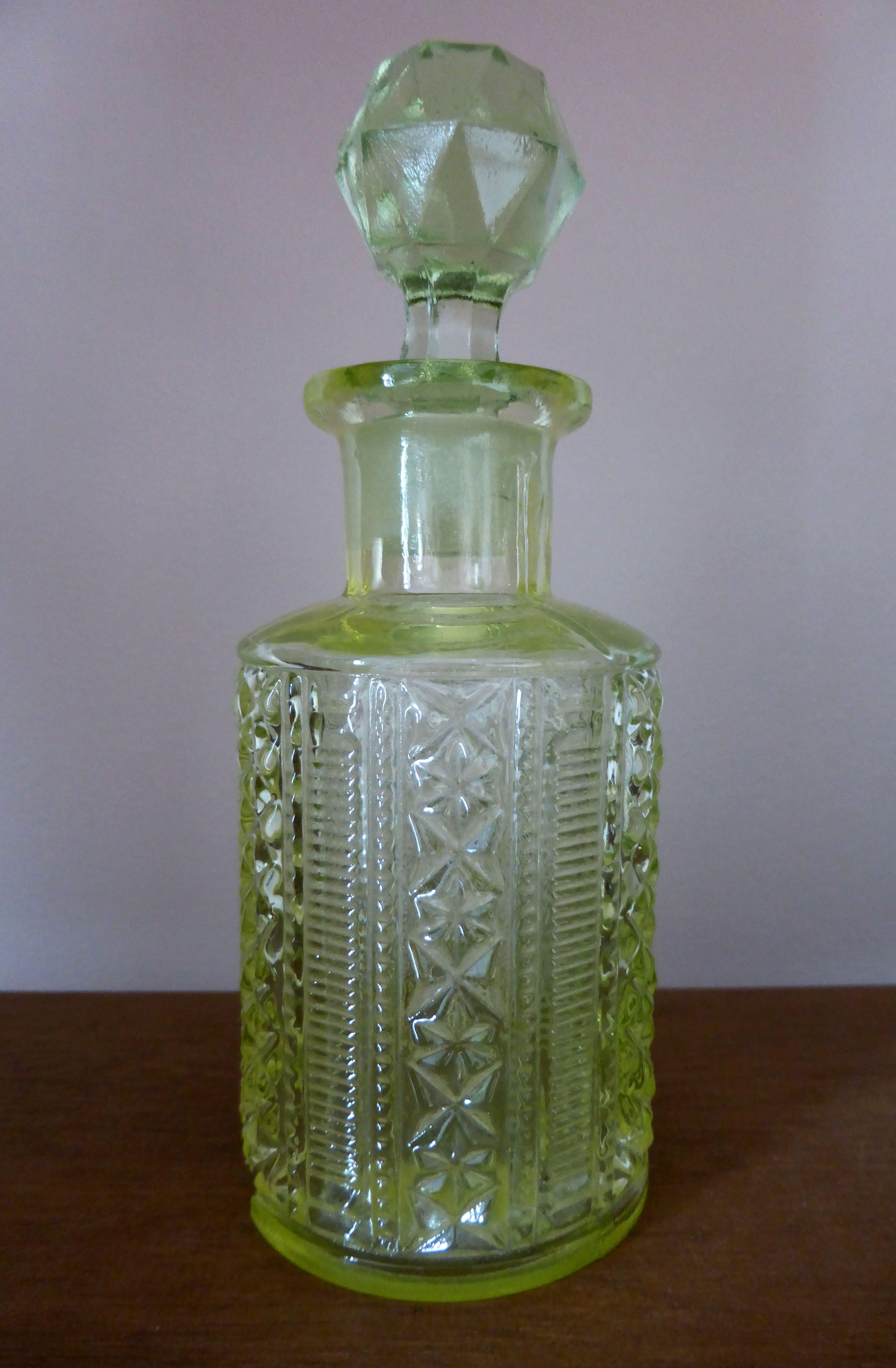 Uranglas-Flacon (Privatsammlung).